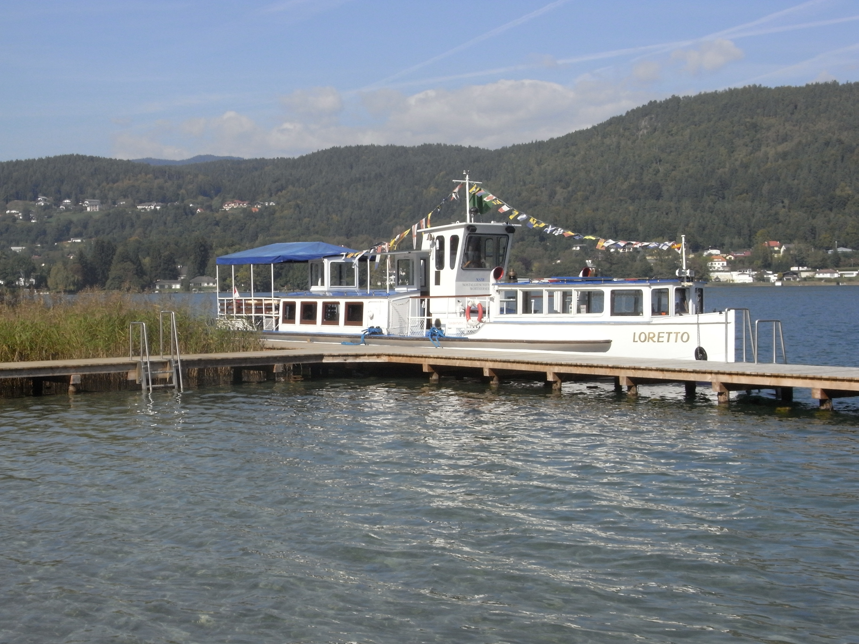 Schiff "Loretto" der Nostalgieschifffahrt Wörthersee